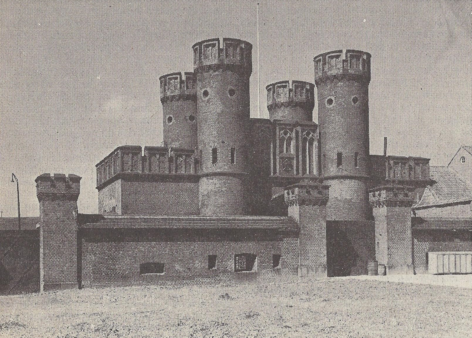 Fotografie der Festung Groß Friedrichsburg in Königsberg (Preußen)